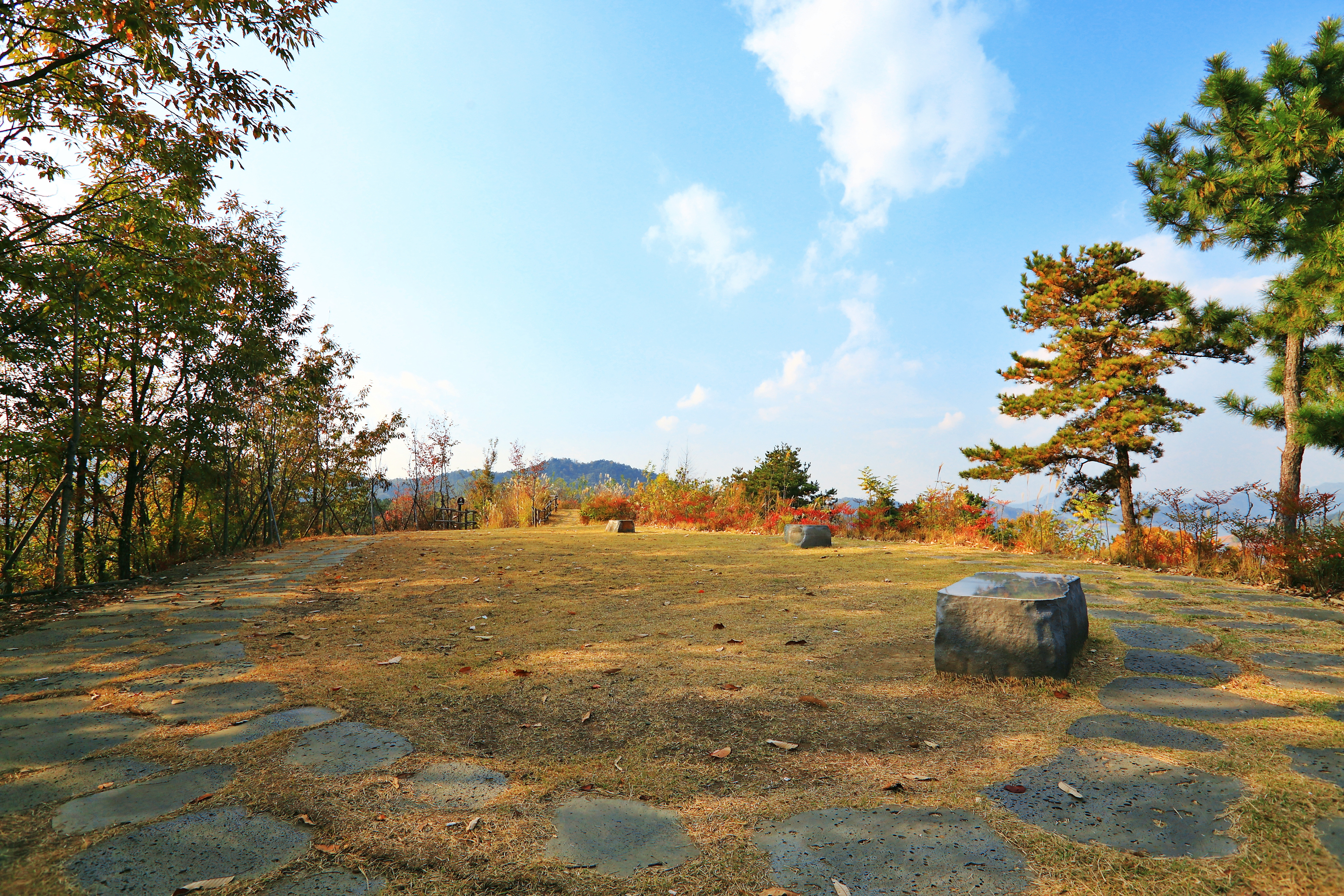 대청호오백리길 3구간_2